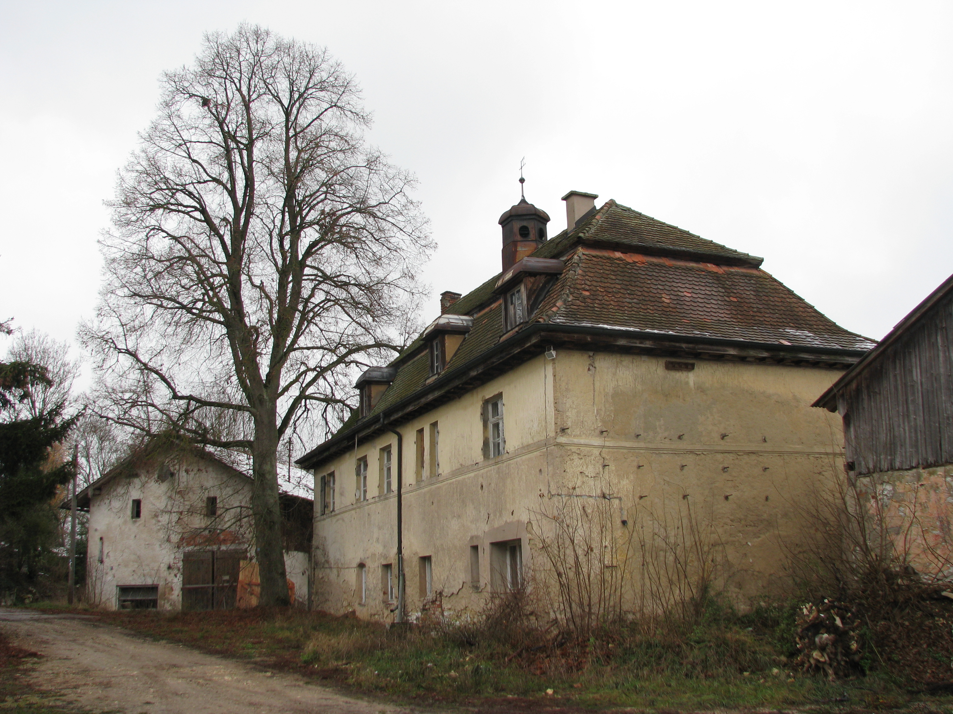 Bleimerschloß bei Kraftsbuch, Ortsteil von Greding im mittelfränkischen Landkreis Roth in Bayern, ehemaliges Gutshaus